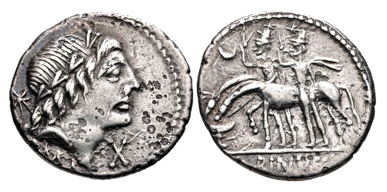 AR Denarius (19mm, 3.93 g, 5h) - 96BC Left : laureate head of Apollo Right : Dioscuri standing beside their horses, which are standing left, drinking at the fountain of Juturna.